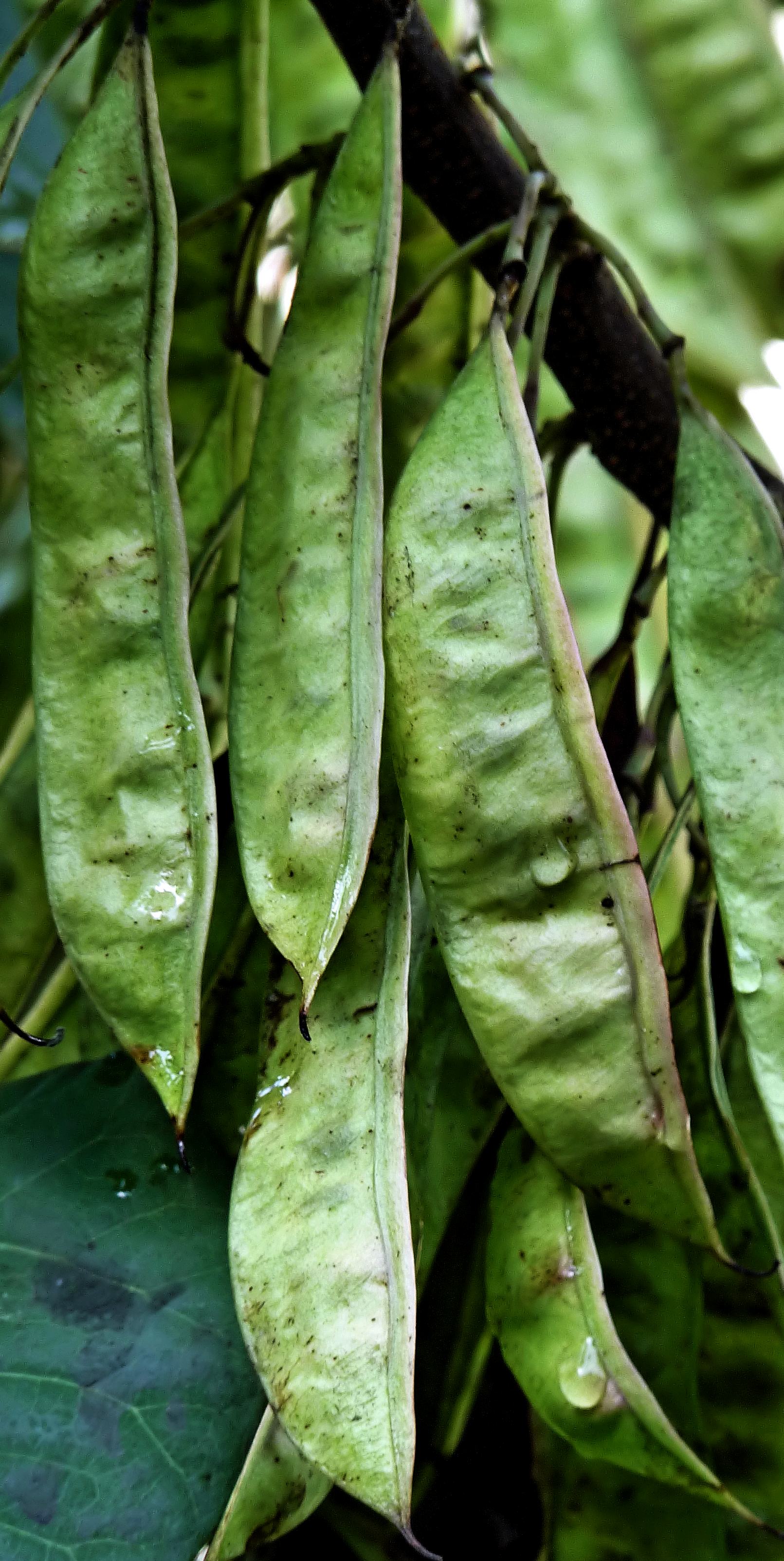 Causses (haricots) de l'arbre de Judée